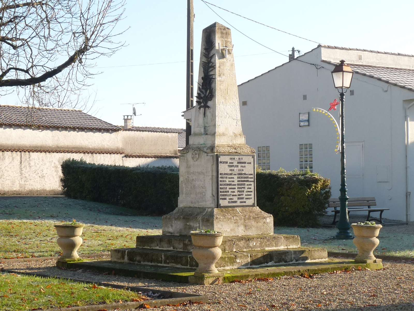 monument aux morts d'Angeac-Champagne, Charente, France